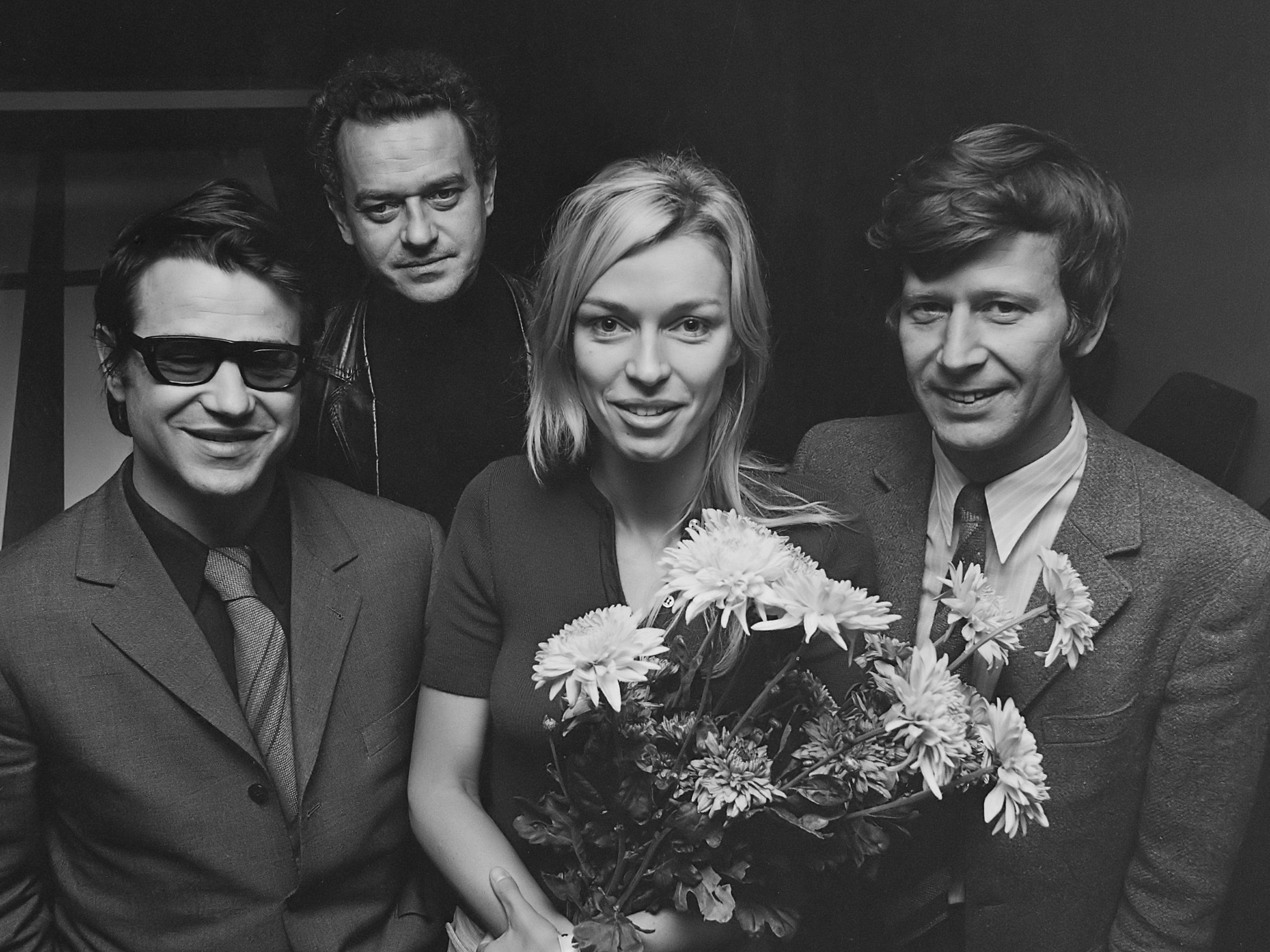 Cabaretgezelschap uit DDR arriveert op Schiphol, v.l.n.r. Hilmar Thate, Wolfgang Bayer, Cox Habbema (in Nederland getrouwd met Esche), Eberhard Esche